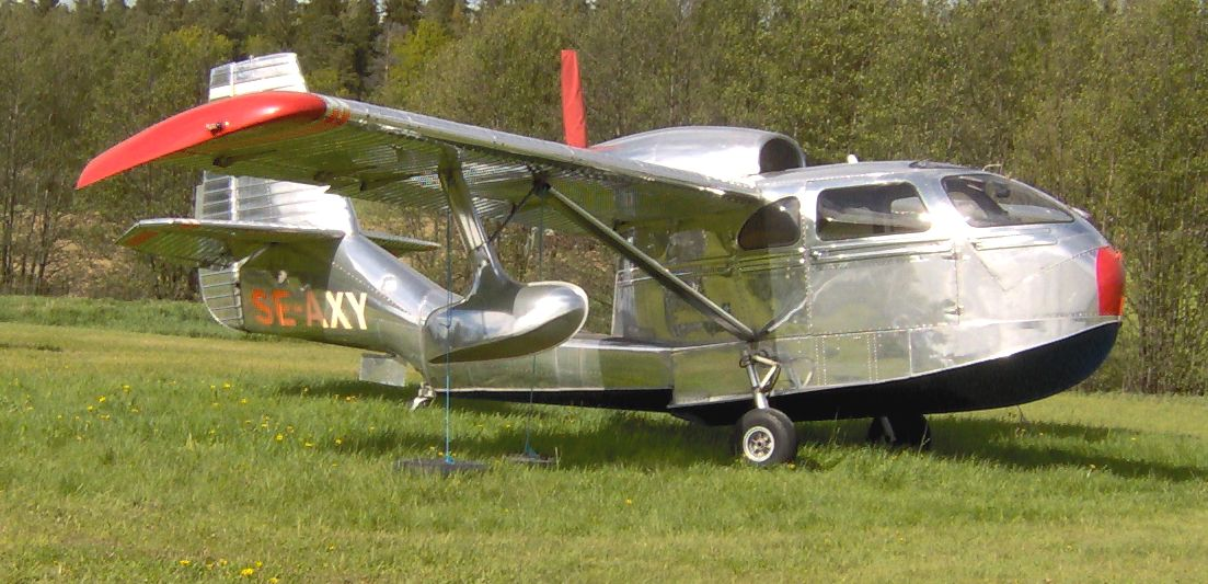 Amfibieplan. Kan både landa och starta från land eller vatten. Amfibieaoroplane can both land and start from airfield or water.